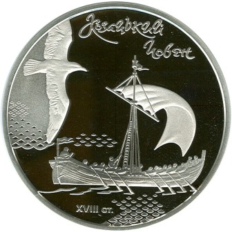 Монета «Козацький човен», реверс